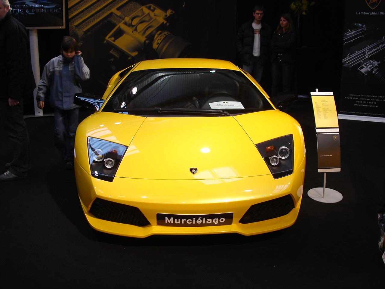 Front eines Lamborghini Murciélago LP640